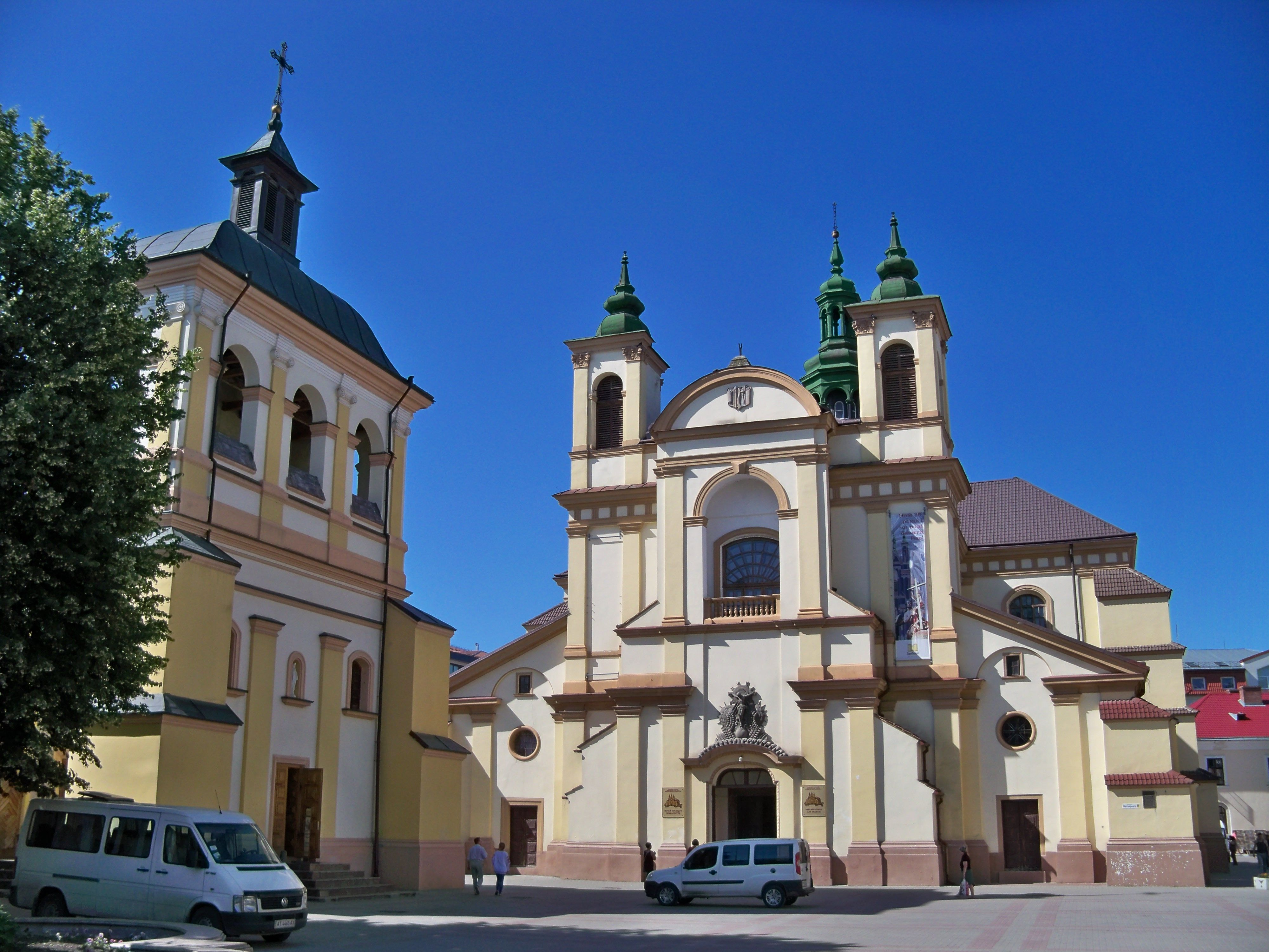 Колегіальний костел Пресвятої Діви Марії (Станіславівська колегіата), Івано-Франківськ, Майдан Шептицького, 8